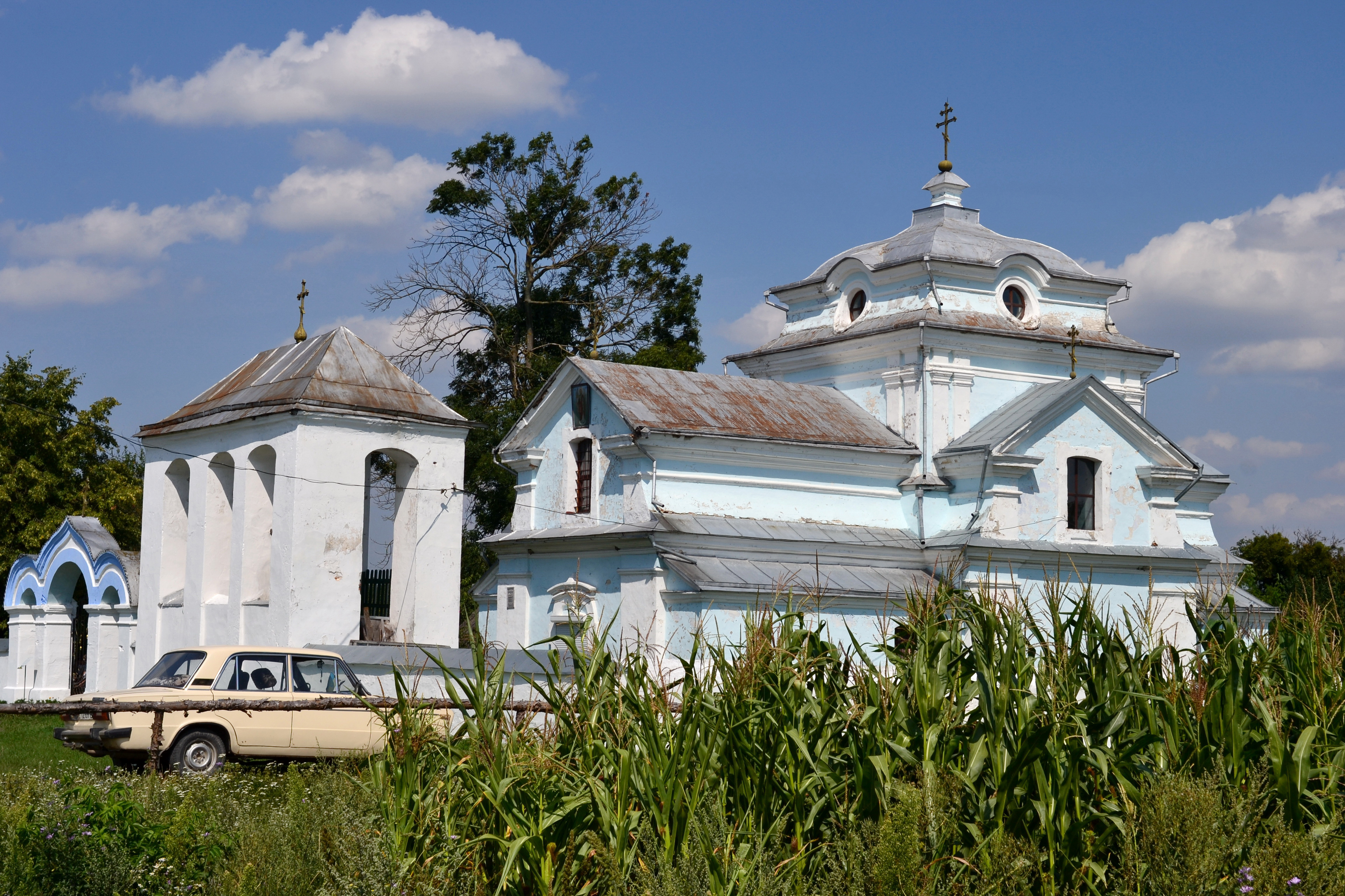 Комплекс Михайлівської церкви (мур.) (1632—1677 роки) - вигляд з південного заходу - Кисилин Локачинський район Волинська область Україна